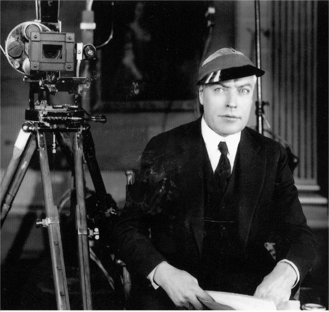 Portrait de Sidney Olcott, pionnier du cinéma américain, acteur, producteur, réalisateur dont la carrière va de 1904 à 1927.